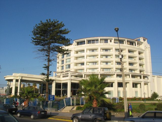 Kasino von Viña del Mar (Chile)